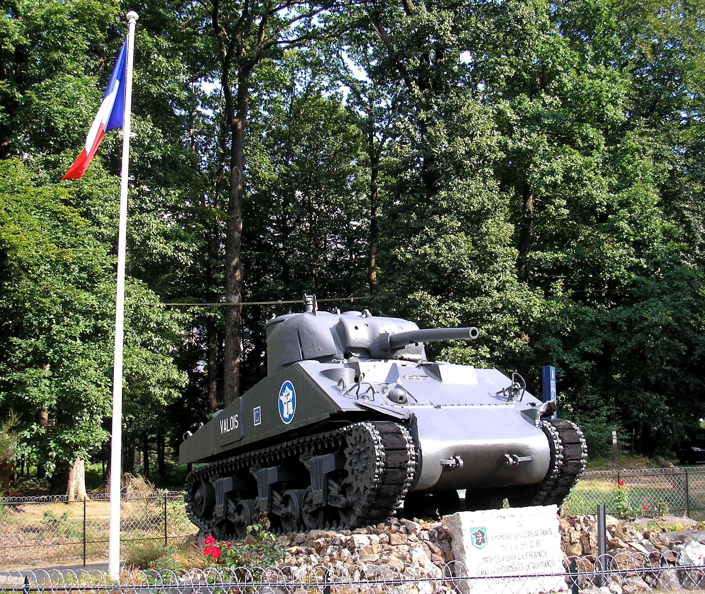 Le Bouillon (Normandie, France). Le char Sherman M4 A2 'Valois' de la IIe DB au carrefour de la croix de Médavy.